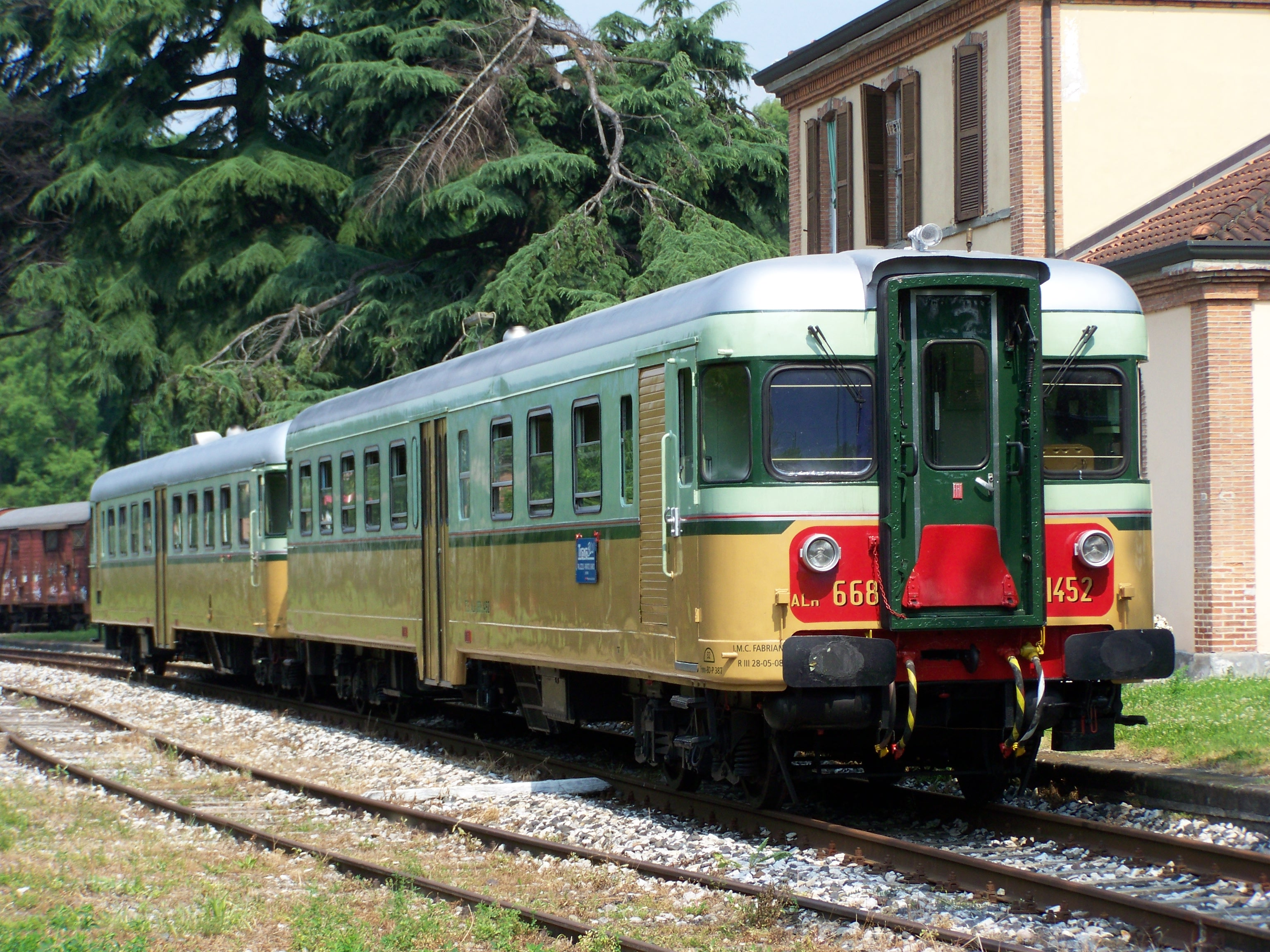 Composizione di automotrici ALn 668.1452 e ALn 668.1401 in livrea storica in sosta sul primo binario della stazione di Paratico-Sarnico.